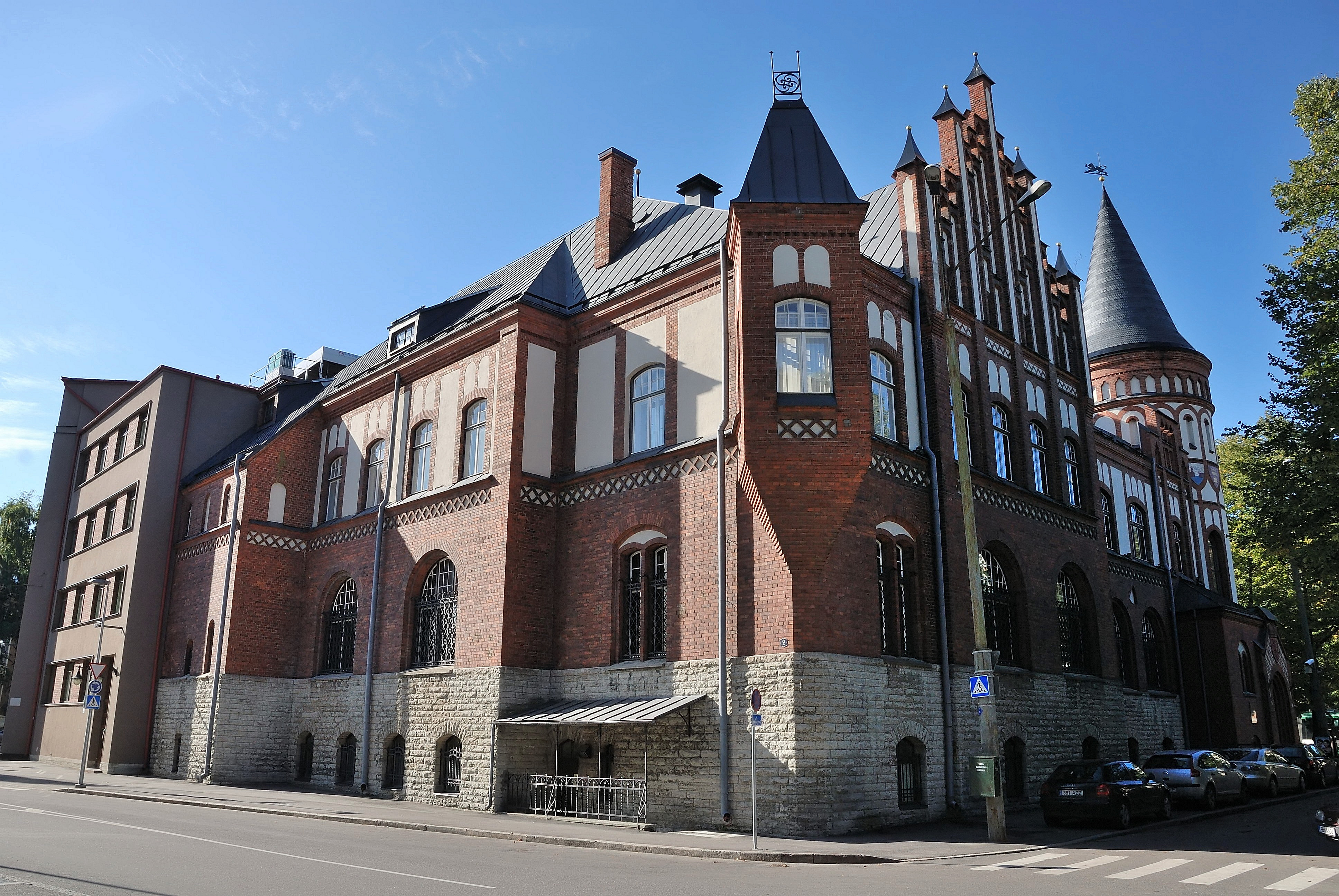 Беларуская (тарашкевіца): Музэй Банку Эстоніі